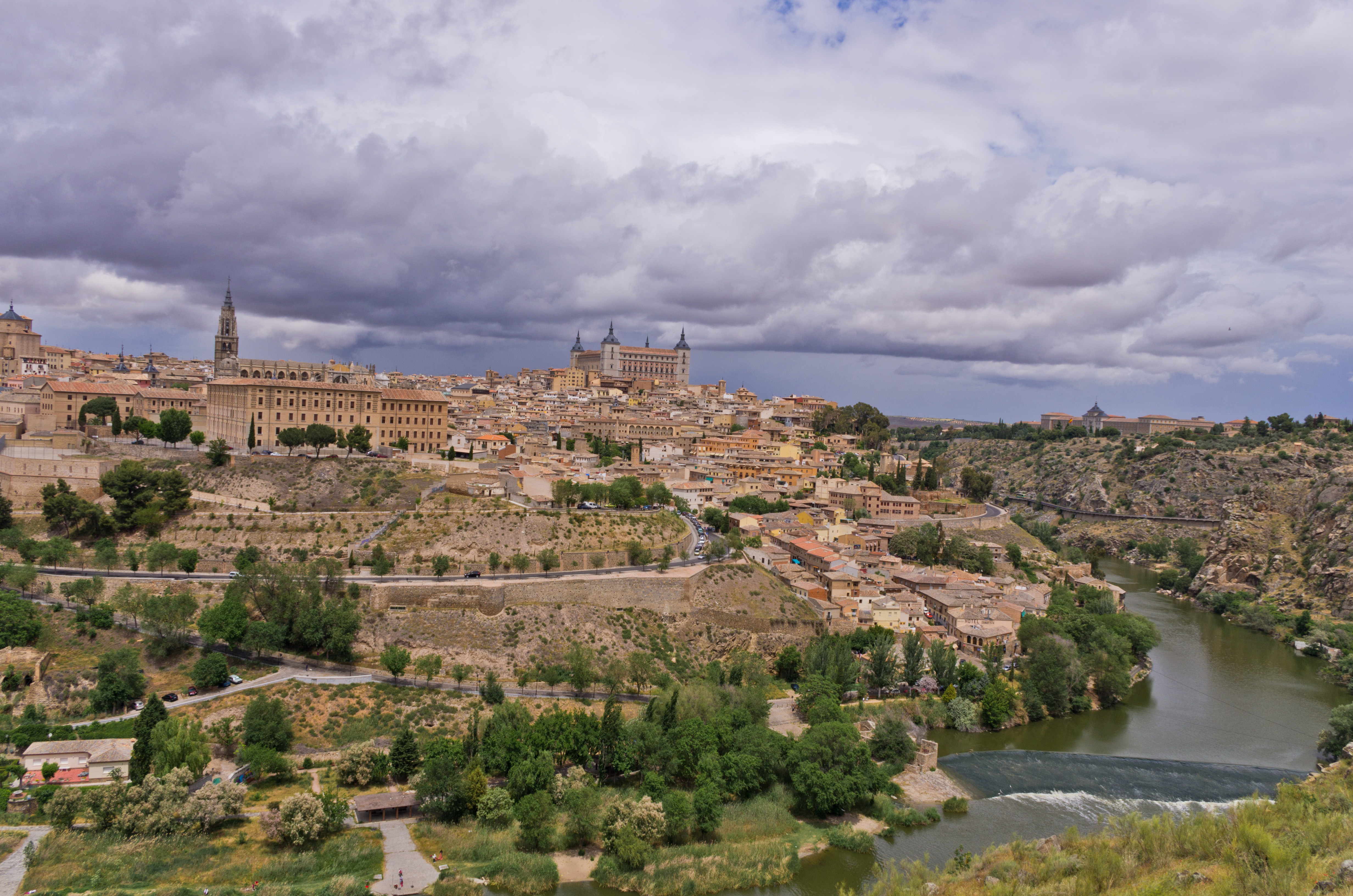 View of Toledo